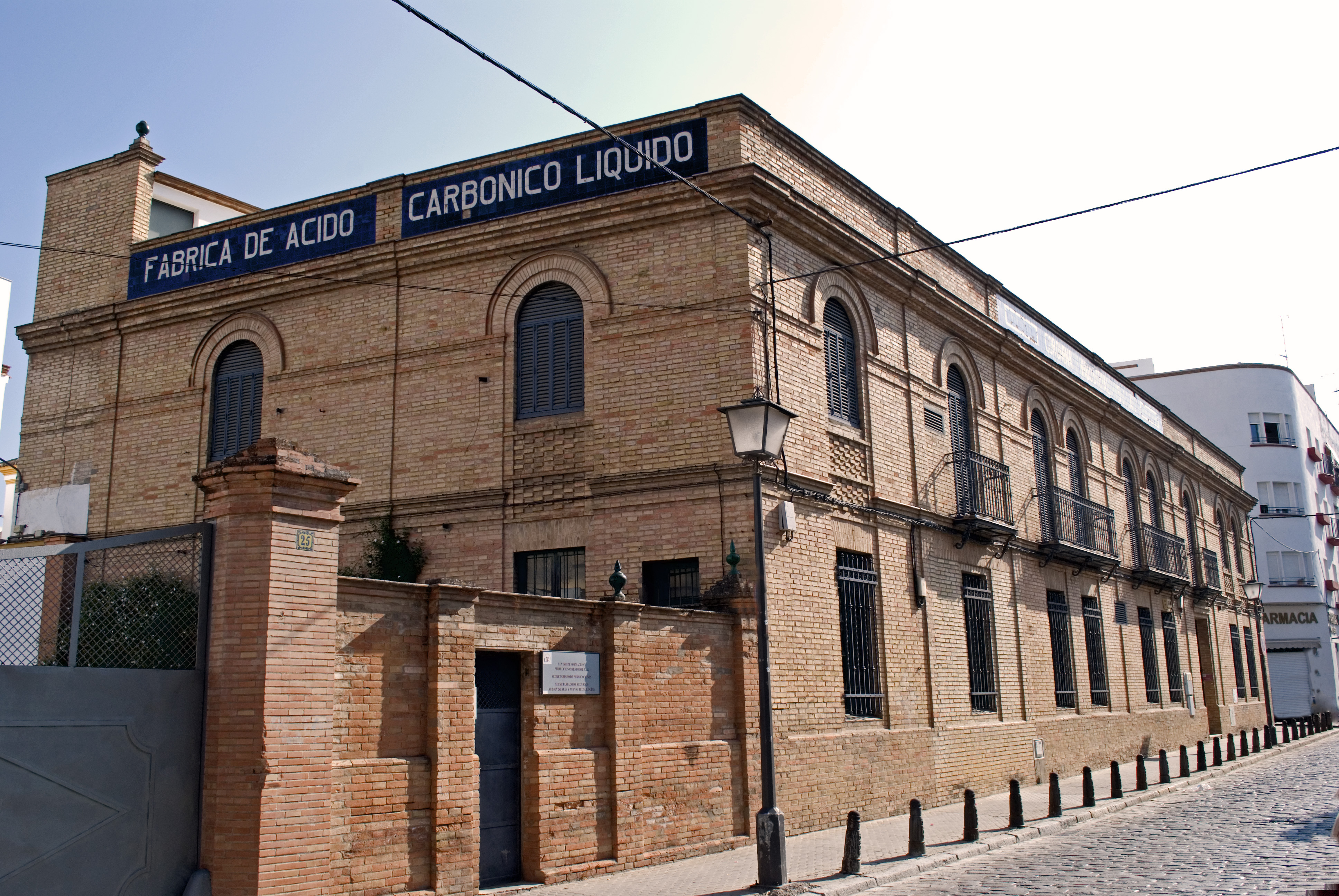 Fábrica Coromina (Sevilla) 1919-1921, arquitecto Aníbal González. Actualmente edificio perteneciente a la Universidad de Sevilla